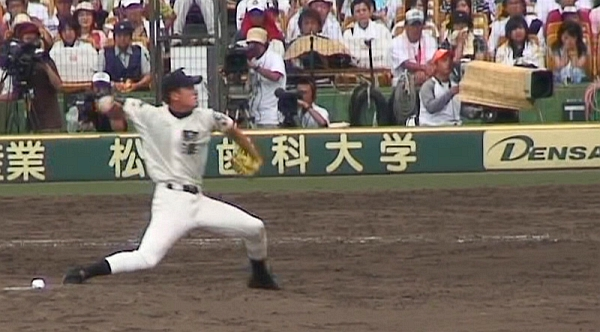 駒大苫小牧高校野球部 田中将大（甲子園球場 対東洋大姫路戦）